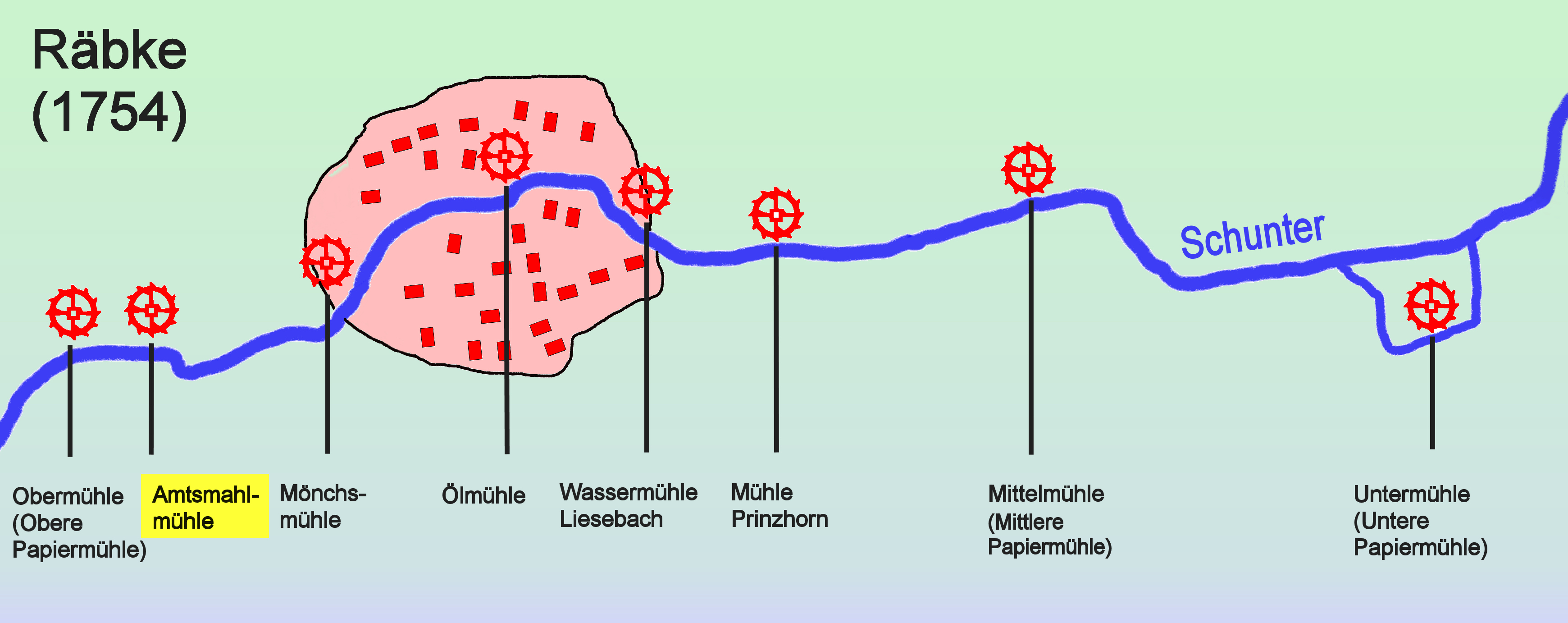 Amtsmahlmühle, Zeichnung nach der Braunschweigischen General-Landesvermessung von 1754